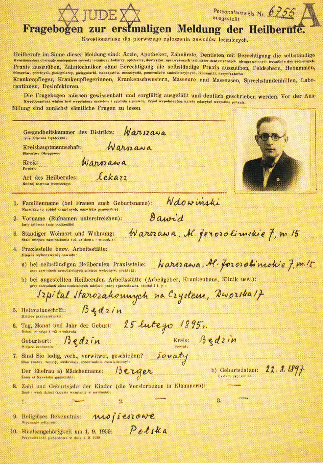 Ankieta personalna Dawida Wdowińskiego